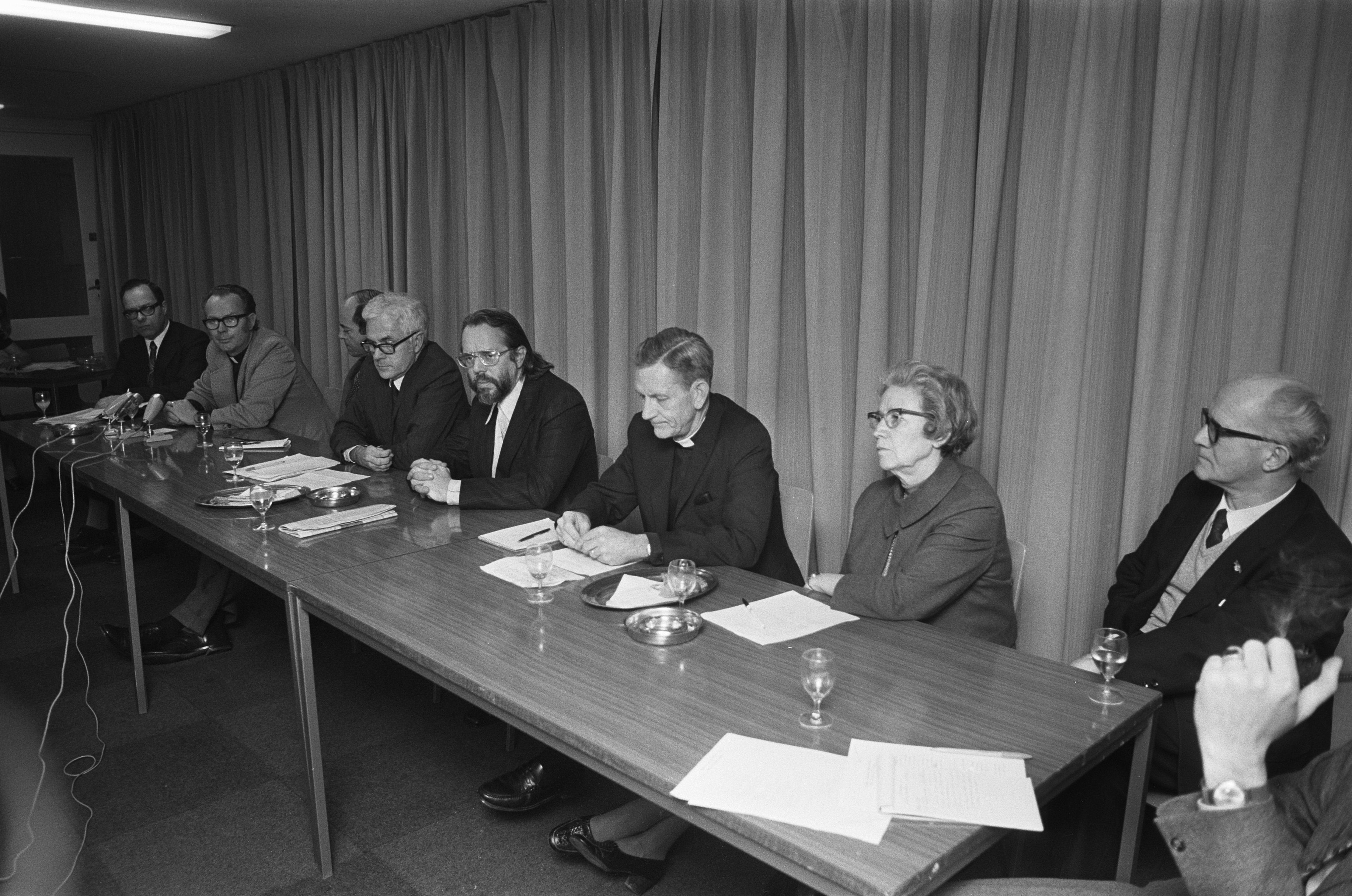 Collectie / Archief : Fotocollectie Anefo Reportage / Serie : [ onbekend ] Beschrijving : Delegatie van Amerikaanse Raad van Kerken spreekt met Nederlandse Kerken over bombardementen in Vietnam, 25A Zuster Mary Luke Tobin , 26A Bisschop Robert de Witt Datum : 9 januari 1973 Trefwoorden : BOMBARDEMENTEN, KERKEN, delegaties Instellingsnaam : Raad van Kerken in Nederland Fotograaf : Croes, Rob C. / Anefo Auteursrechthebbende : Nationaal Archief Materiaalsoort : Negatief (zwart/wit) Nummer archiefinventaris : bekijk toegang 2.24.01.05 Bestanddeelnummer : 926-1455